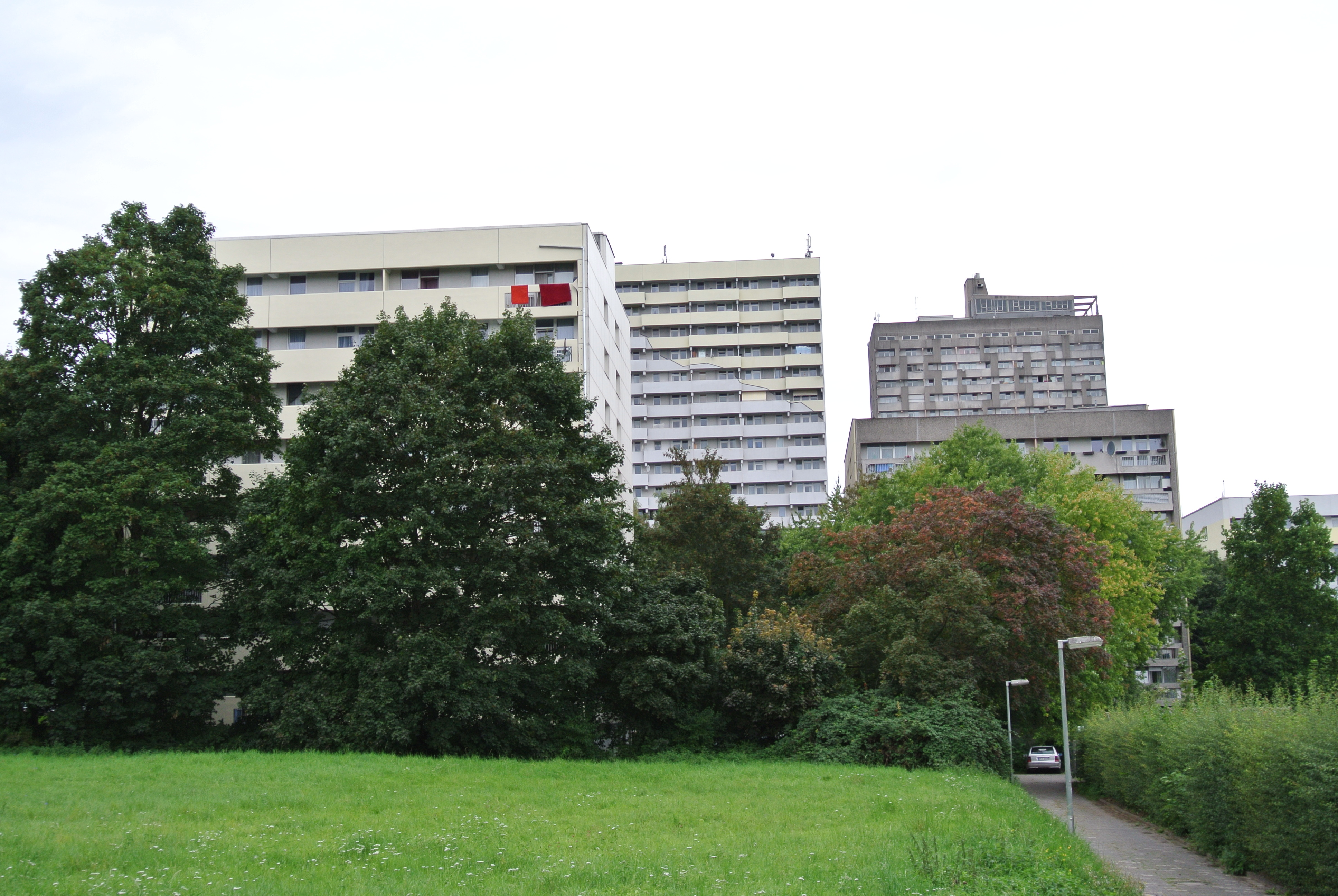 Siedlung Berkersheimer Weg im Frankfurter Stadtteil Frankfurter Berg aus den 1960er Jahren